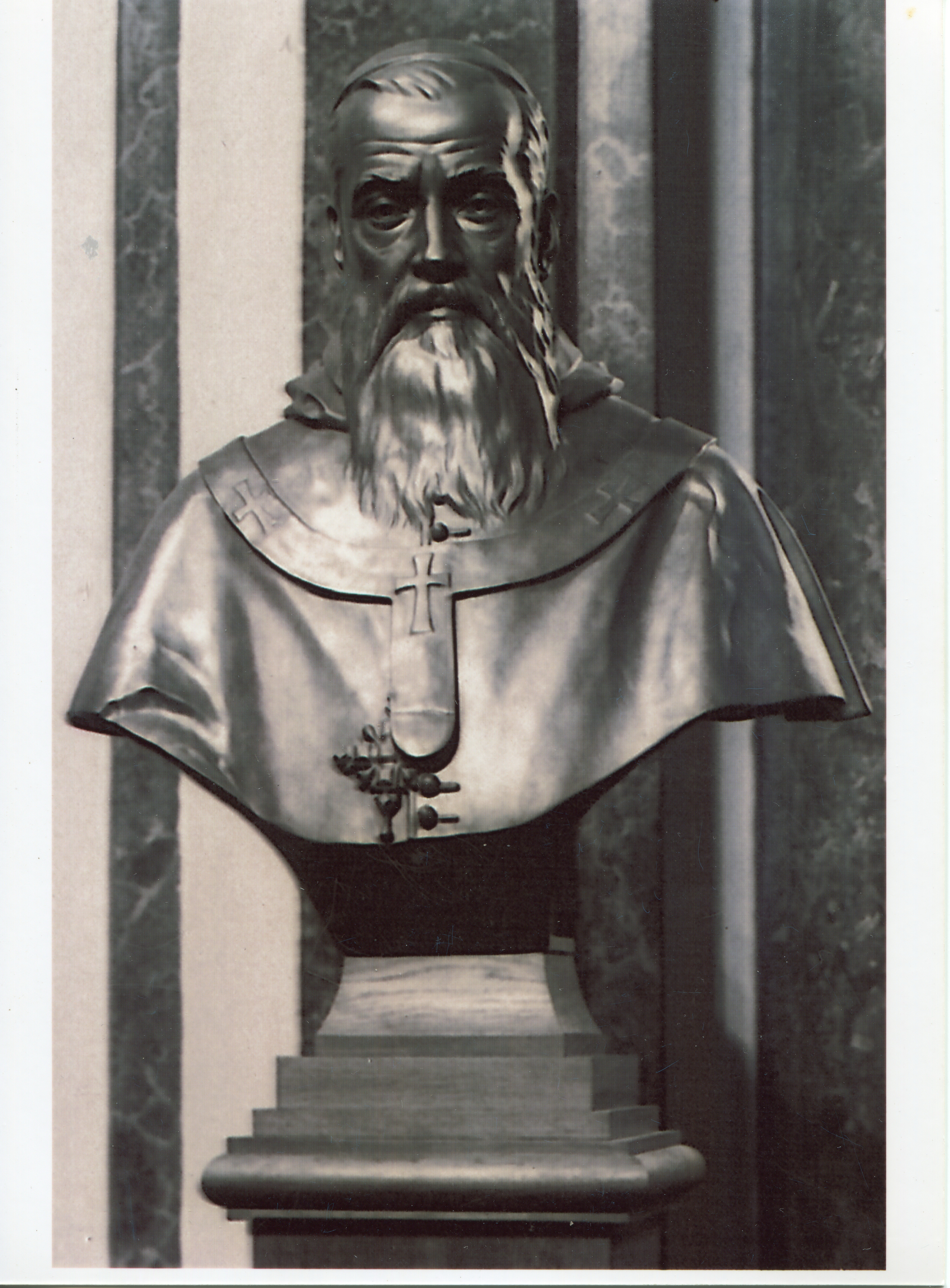 Vastagh László: Lósy Imre érsek portréja